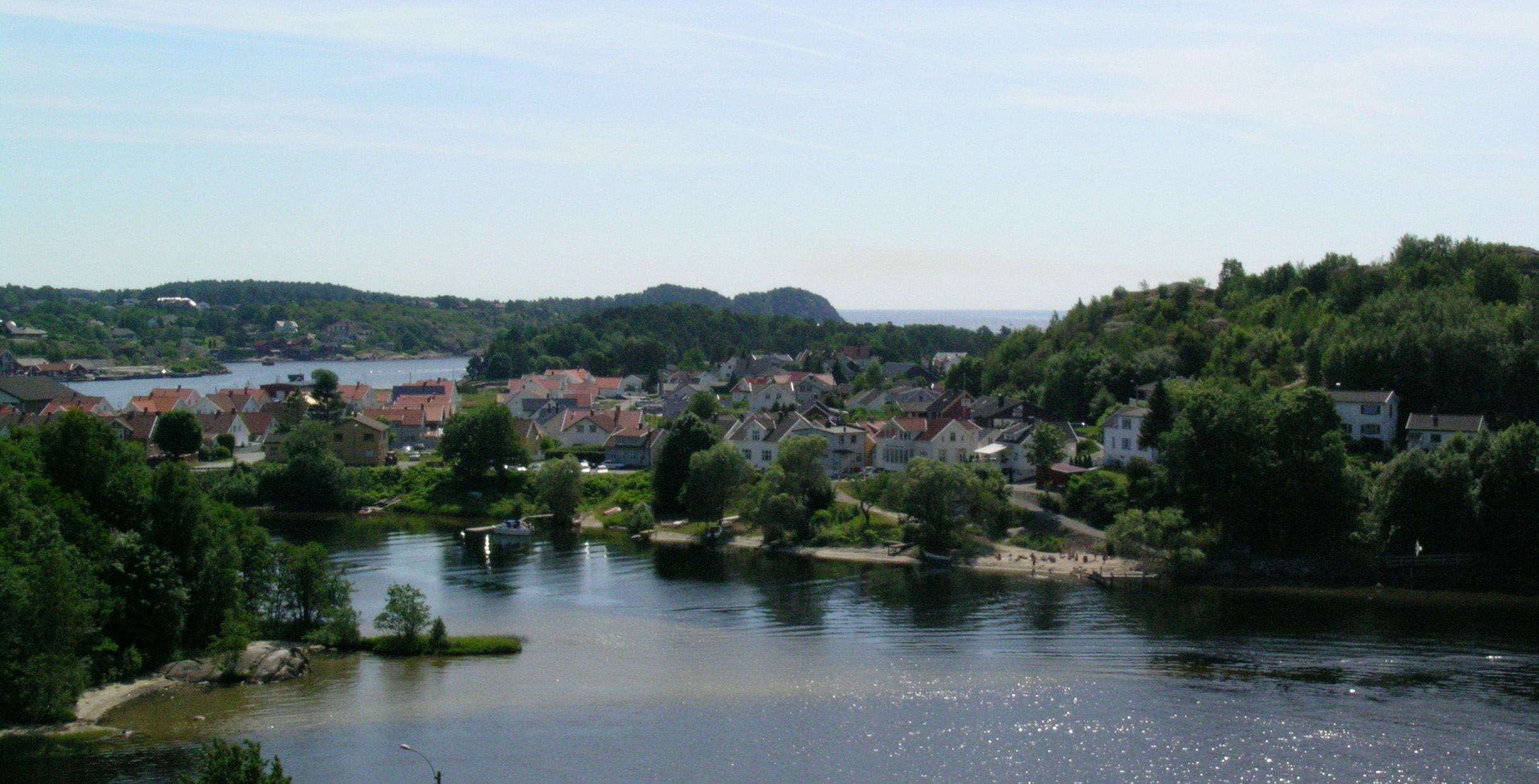 Østre Halsen, Larvik, Norway.